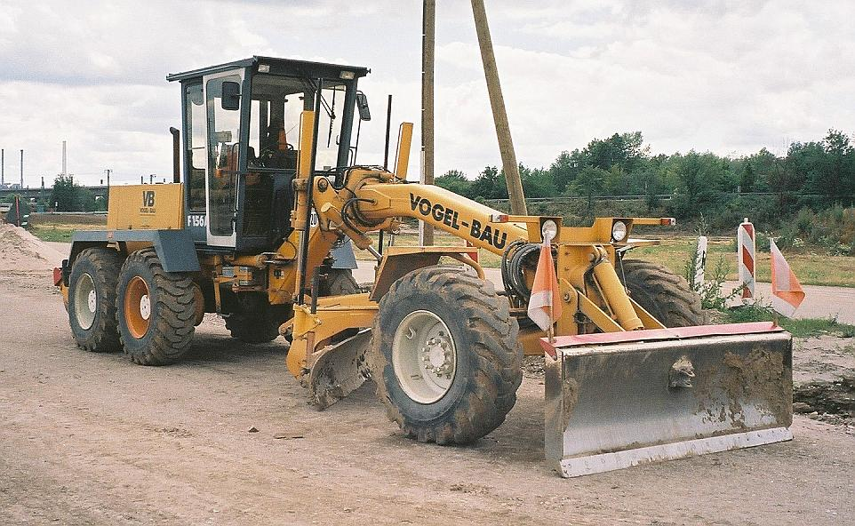 Grader O&K F 156 A auf einer Baustelle im Juli 2004